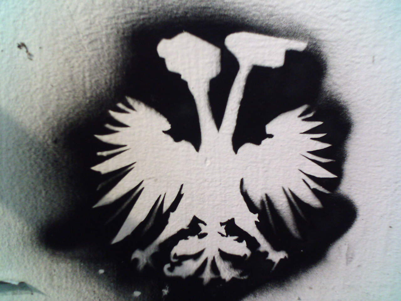 foto taken by myself in linz on september 28, 2005. Bild zeigt ein STENCIL bzw. Pochoir mit einem Doppelkopfadler, wobei die Köpfe durch Kameras ersetzt wurden, um auf "den" Überwachungsstaat aufmerksam zu machen.